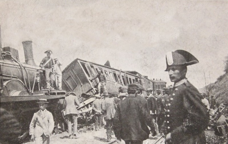 Incidente ferroviario di Castel Giubileo 1900